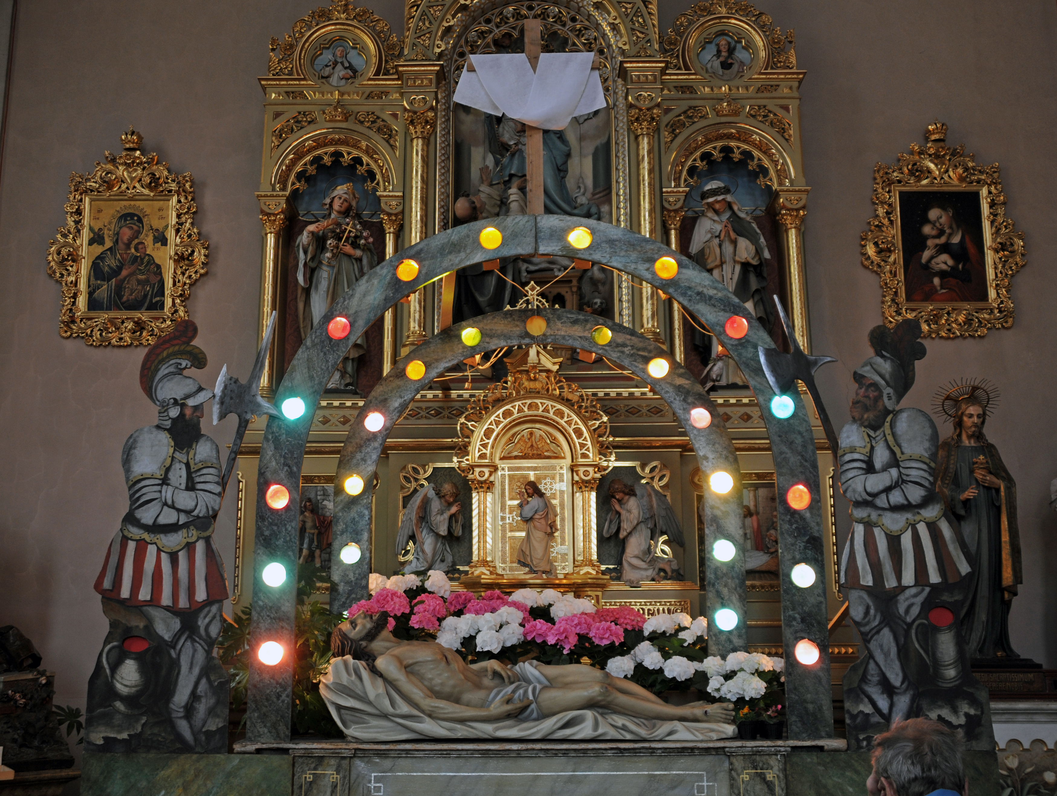 in the parish church in Urtijei, St. Ulrich in Gröden - Ortisei Val Gardena